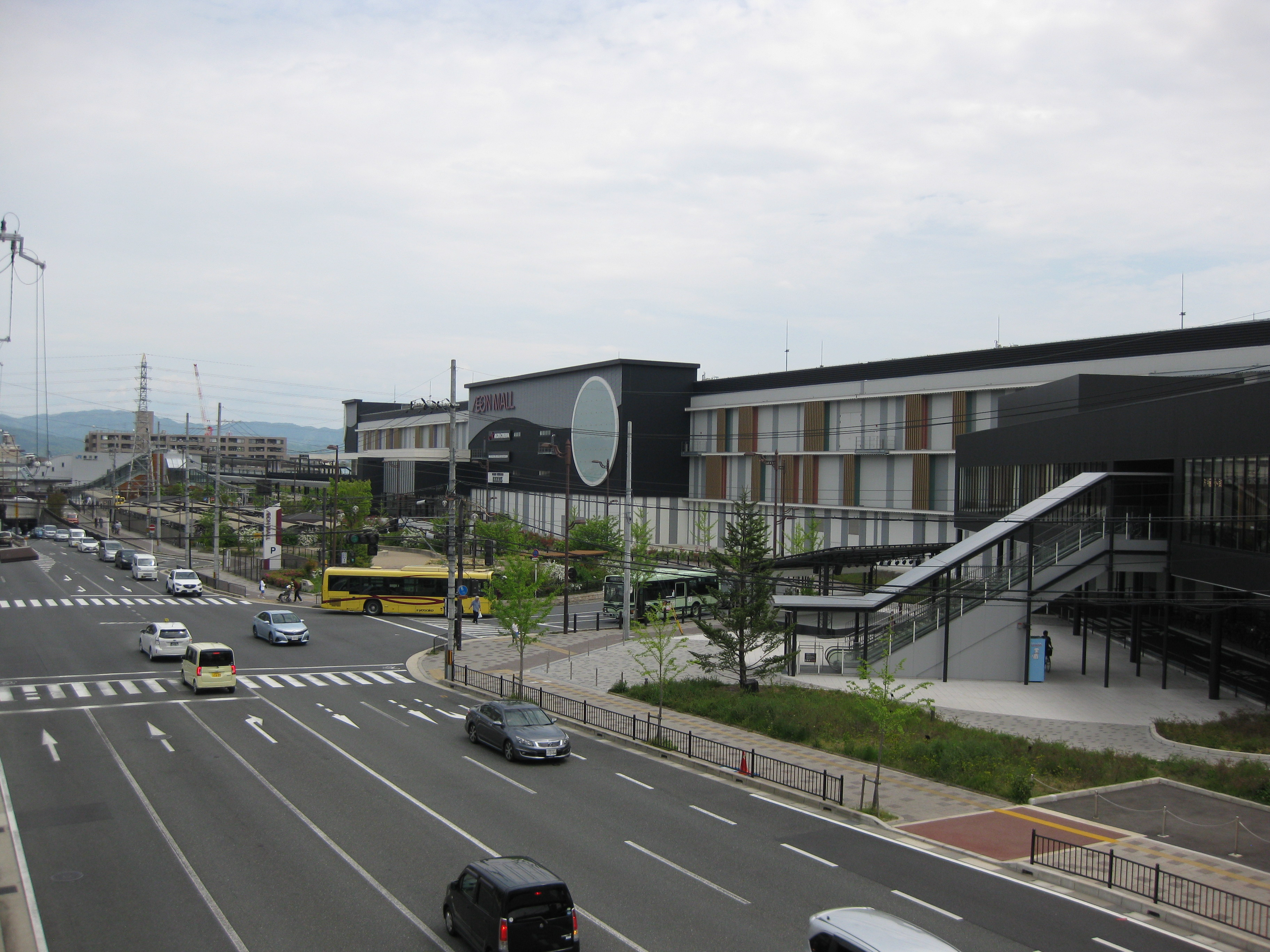 イオンモール京都桂川と桂川駅